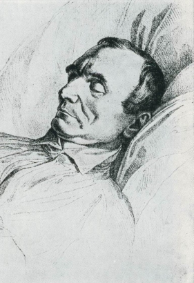 František Tkadlík - litografie od Josefa Mánesa, 1840